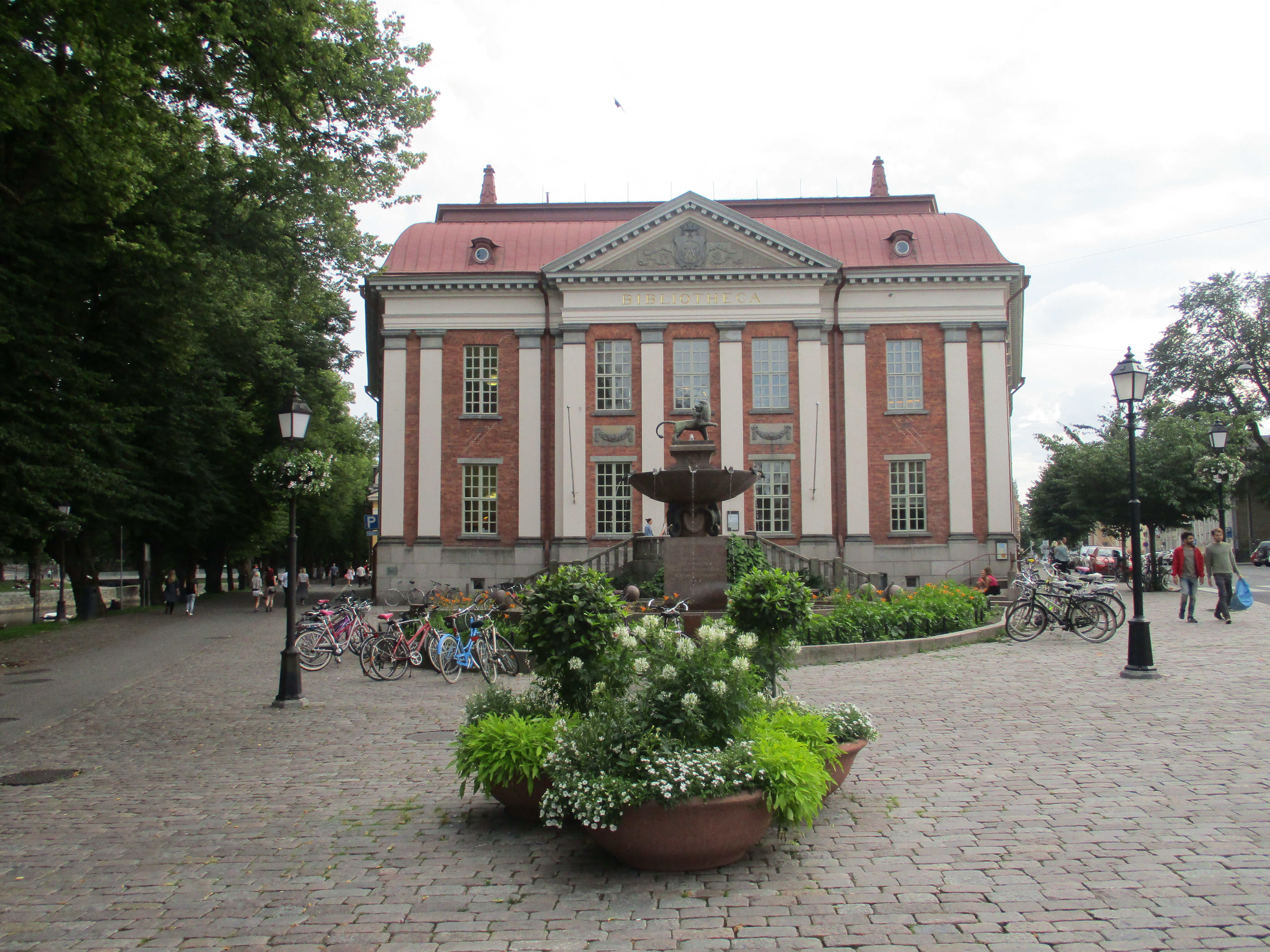 Turun kaupunginkirjaston pääkirjasto; chief branch of Turku City Library in Finland This is a photo of a monument in Finland identified by the ID 'Turku Main Library' (Q7855553)